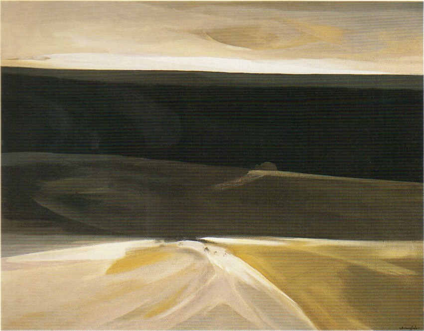 Ruizanglada - Paisaje Serie Negra I 114x146 1984 A/L